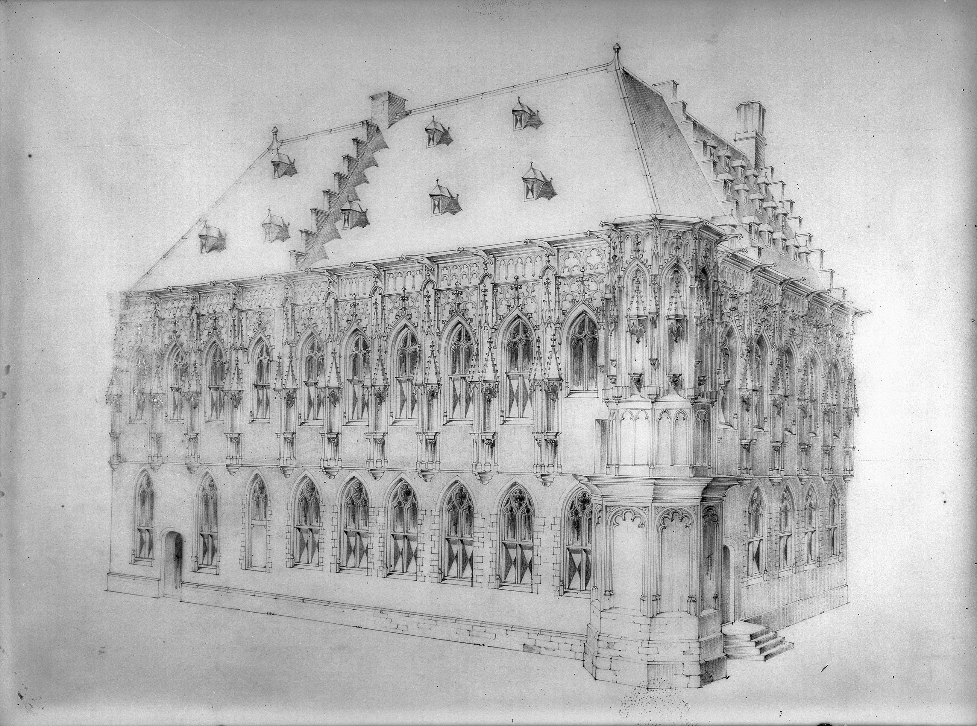 Stadhuis: naar potloodtekening van Heeswijk